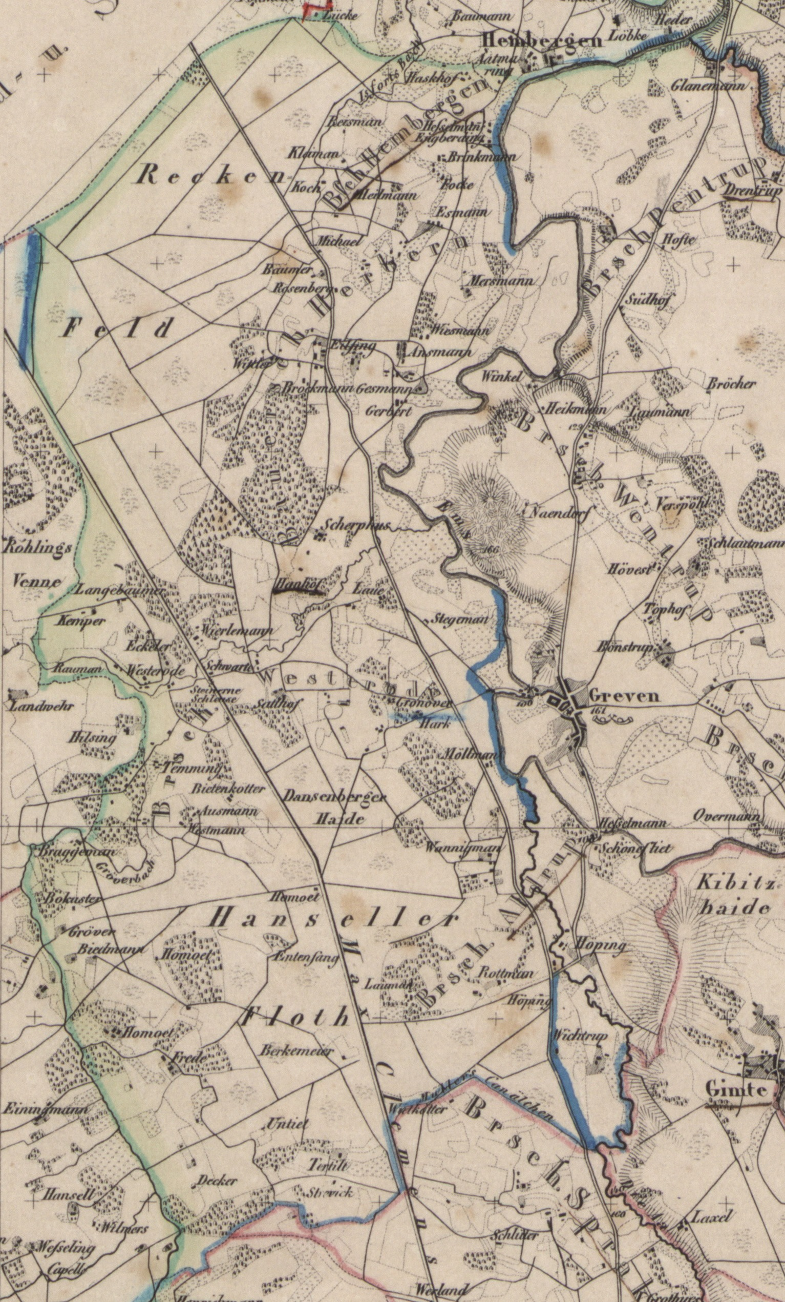 Location of Greven links der Ems